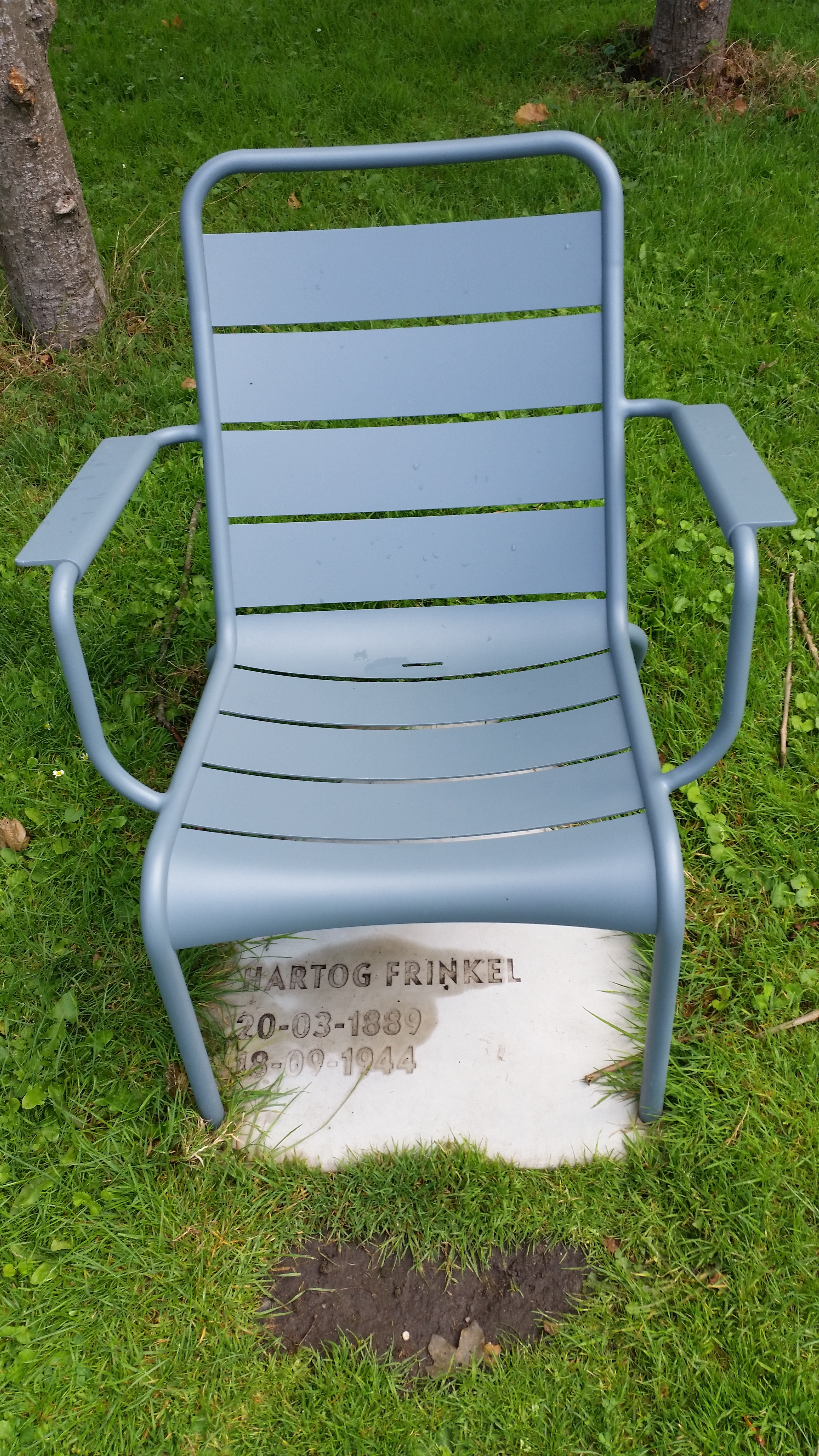 Een van de stoelen van Rozenoord (Amsterdam)